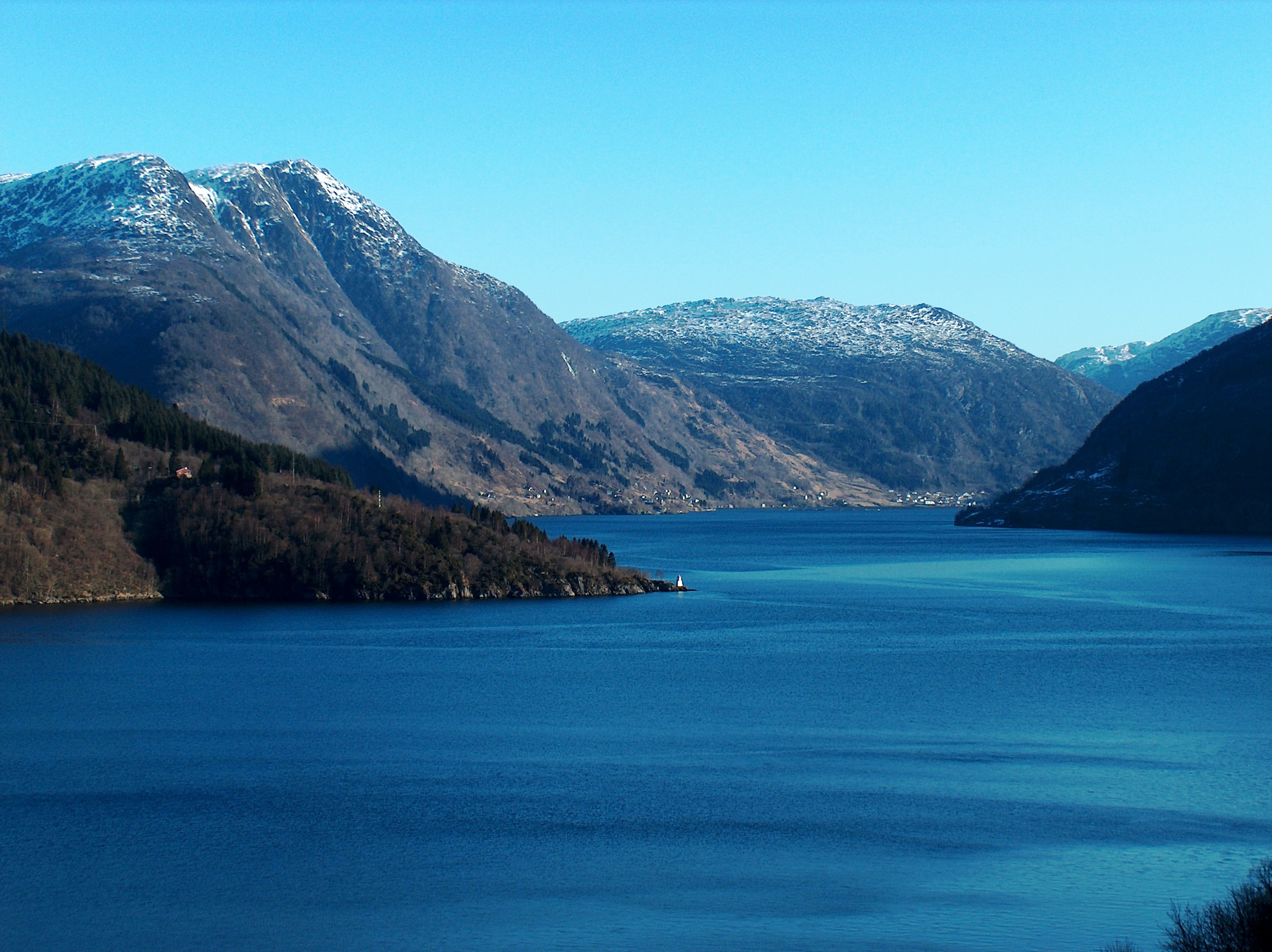 Sørfjorden mot Bruvik, Bergen in Norway.